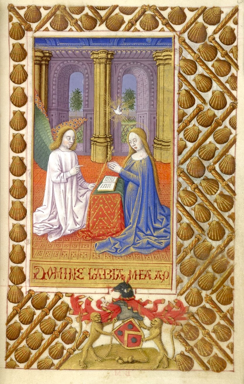 Maître de Jean Charpentier Heures British Library (Harley 2863, f30) Annonciation